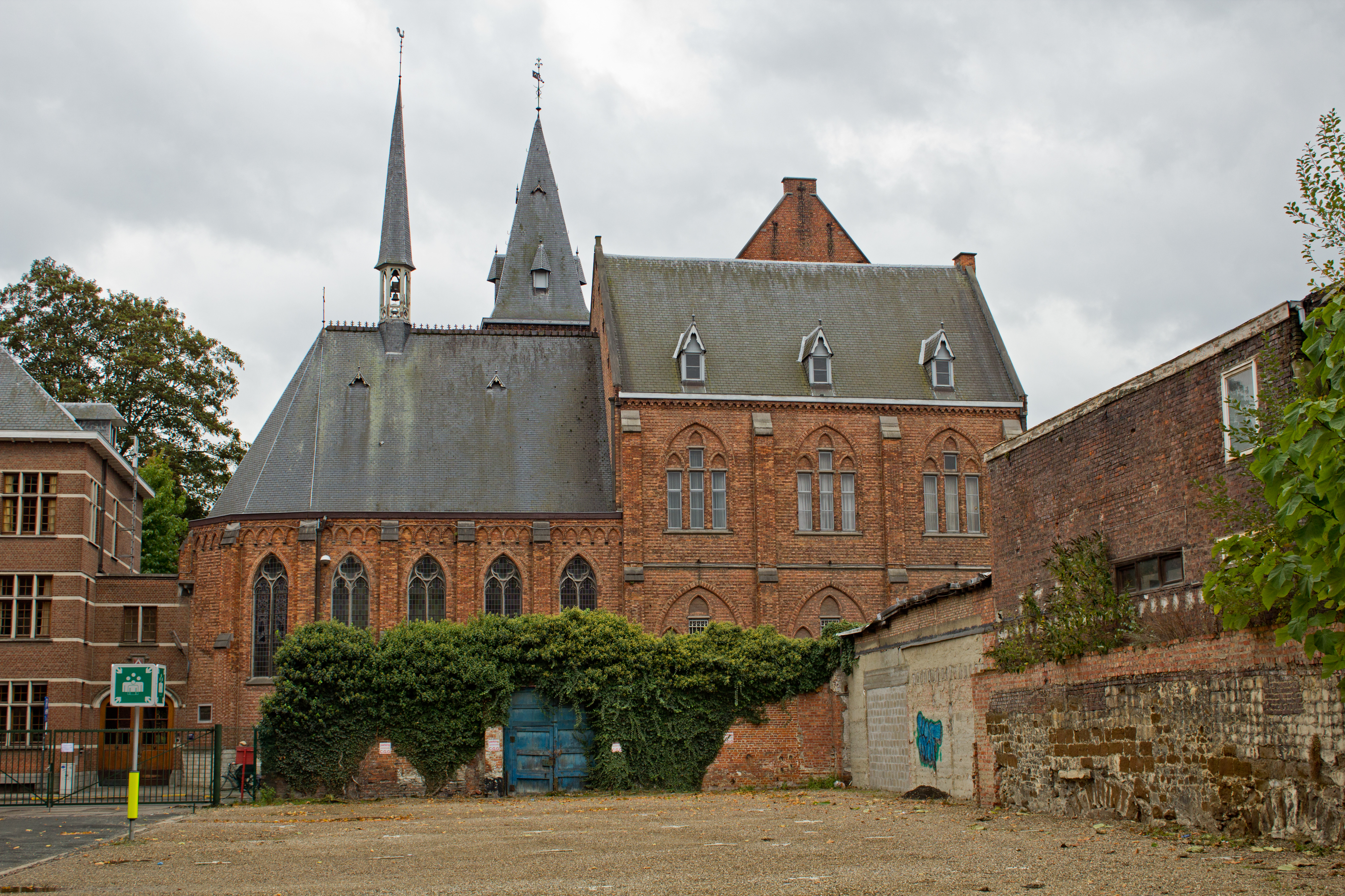 Het Justius Lipsiuscollege te Leuven